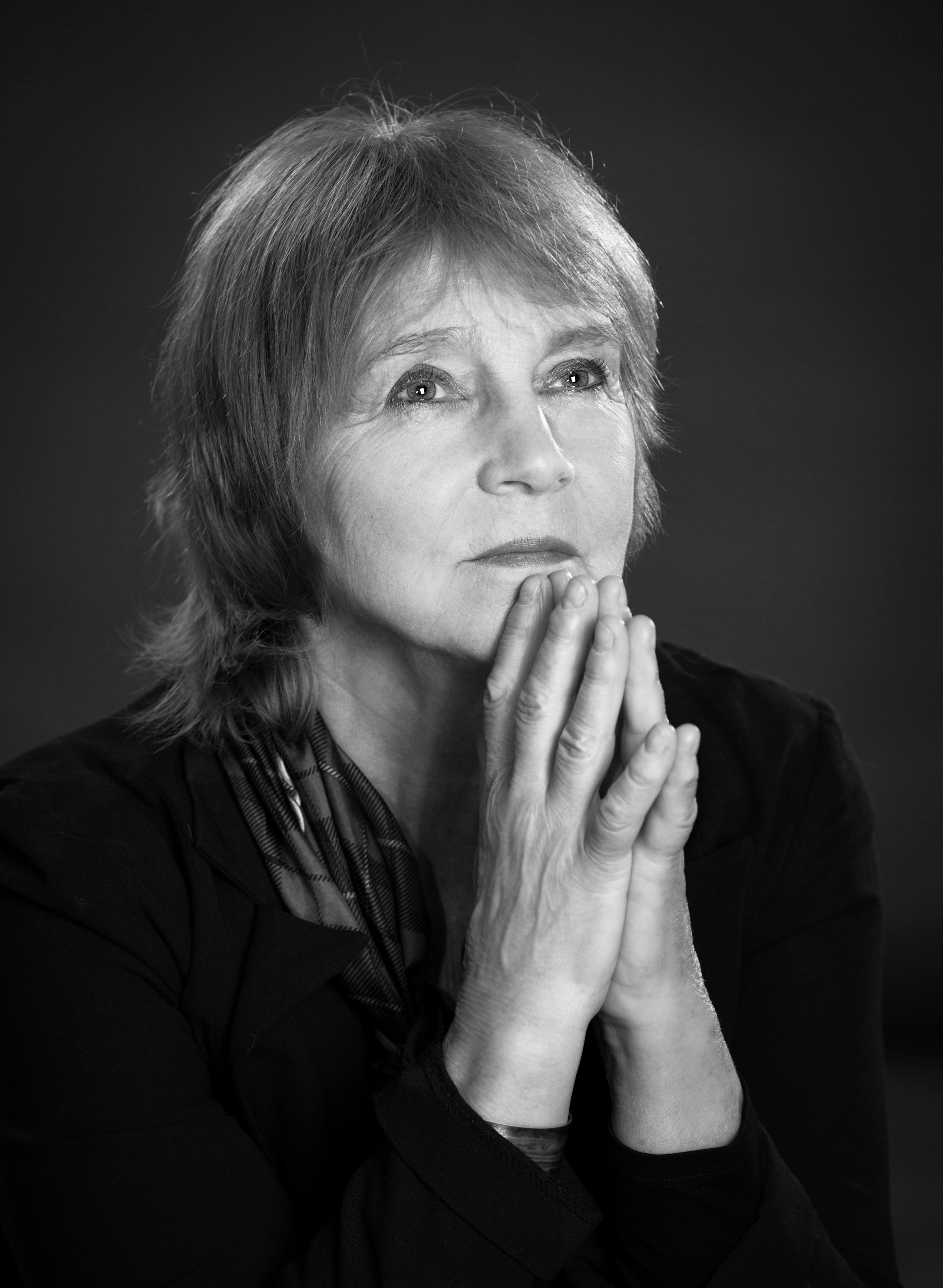 foto Elena Svetozarova